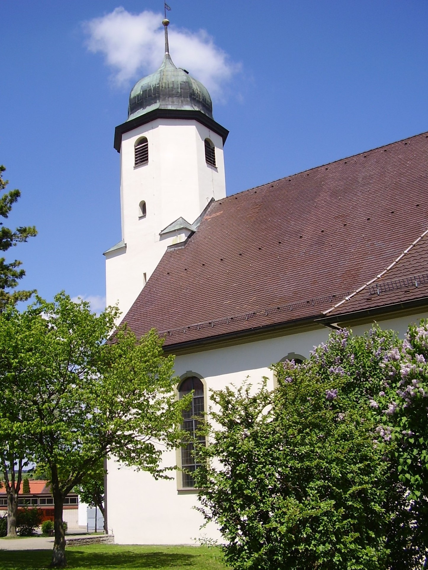 Ev. Kirche in Steinheim am Albuch